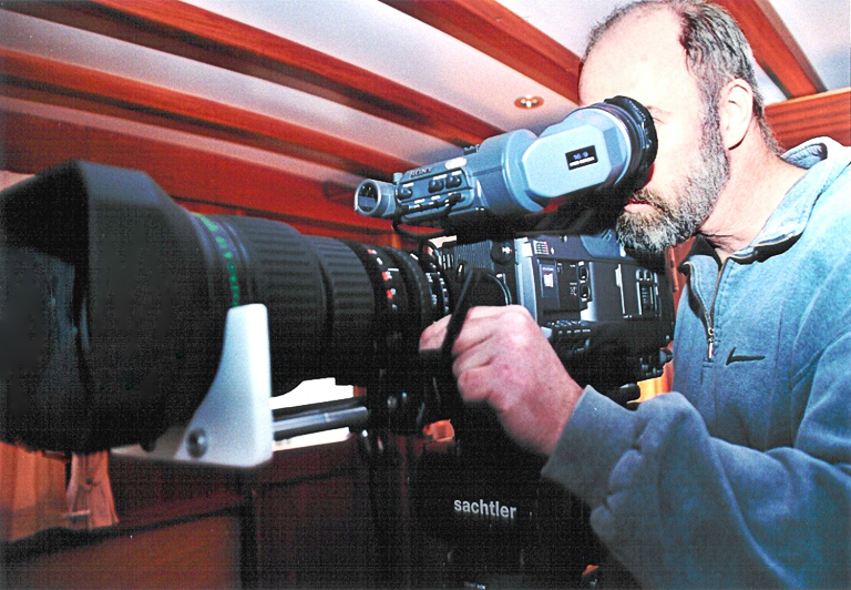 Verstecke Aufnahmen von Bord der Pirol